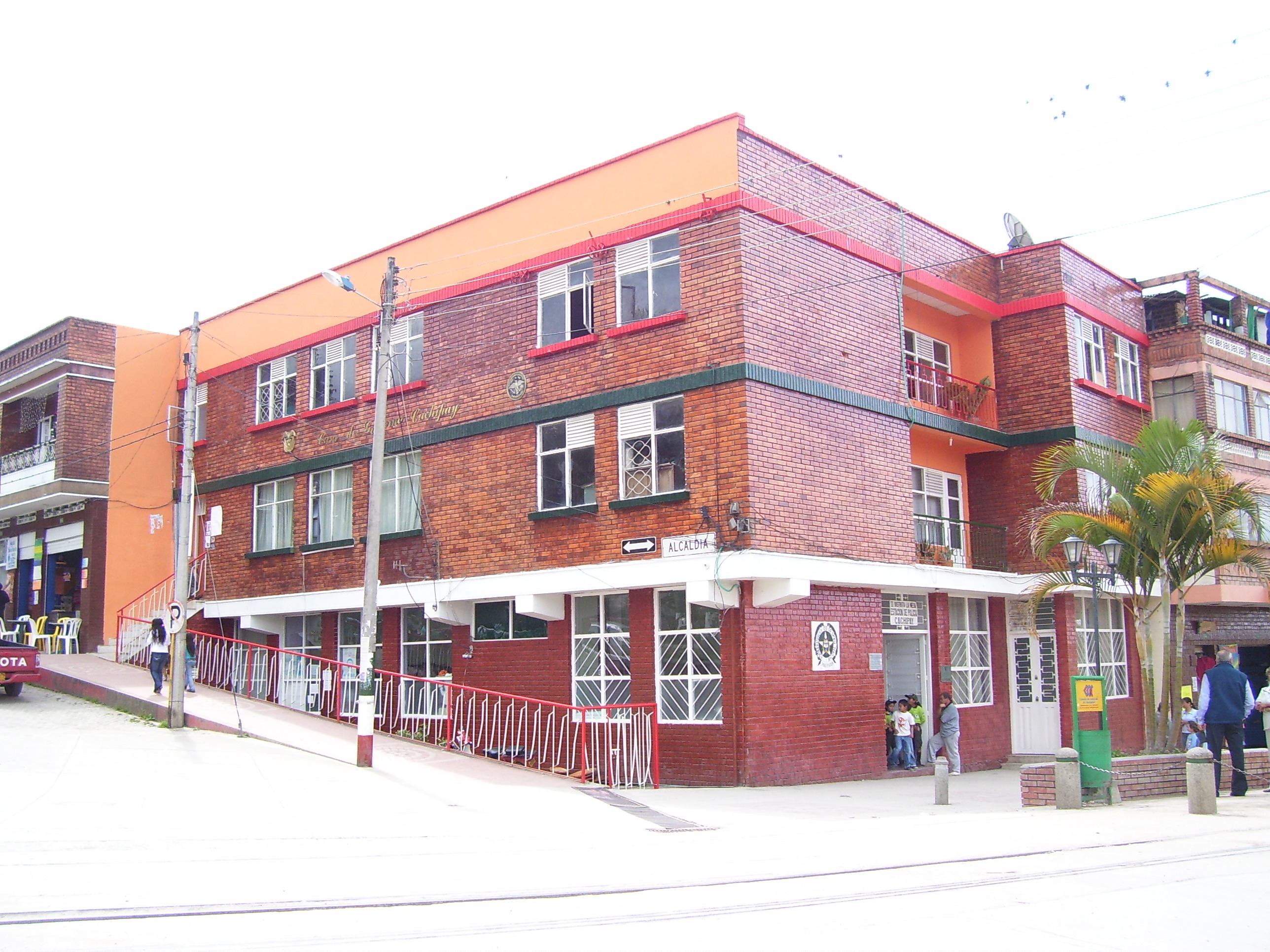 Casa de Govierno de Cachipay Cundinamarca